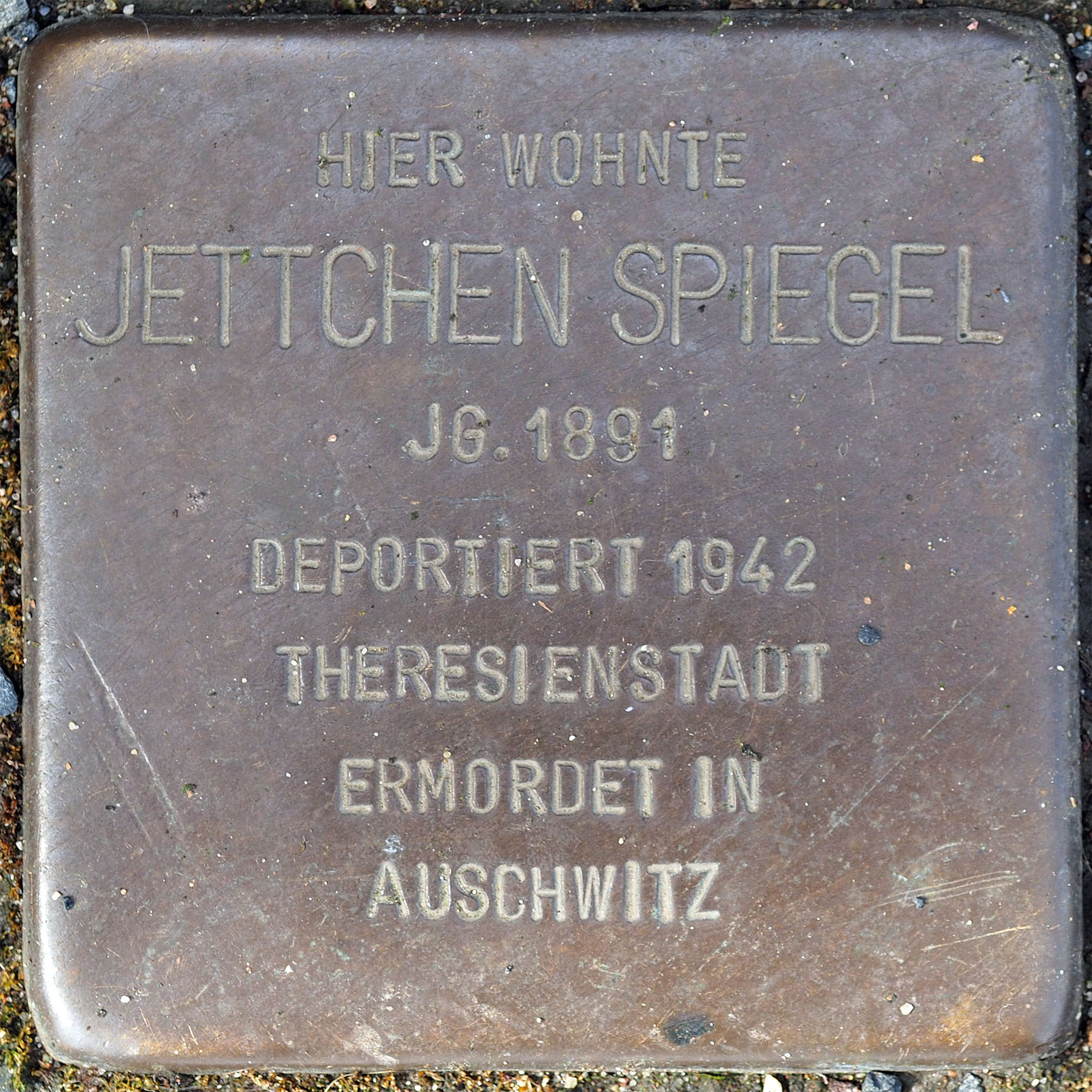 Stolpersteine MG: Spiegel, Jettchen